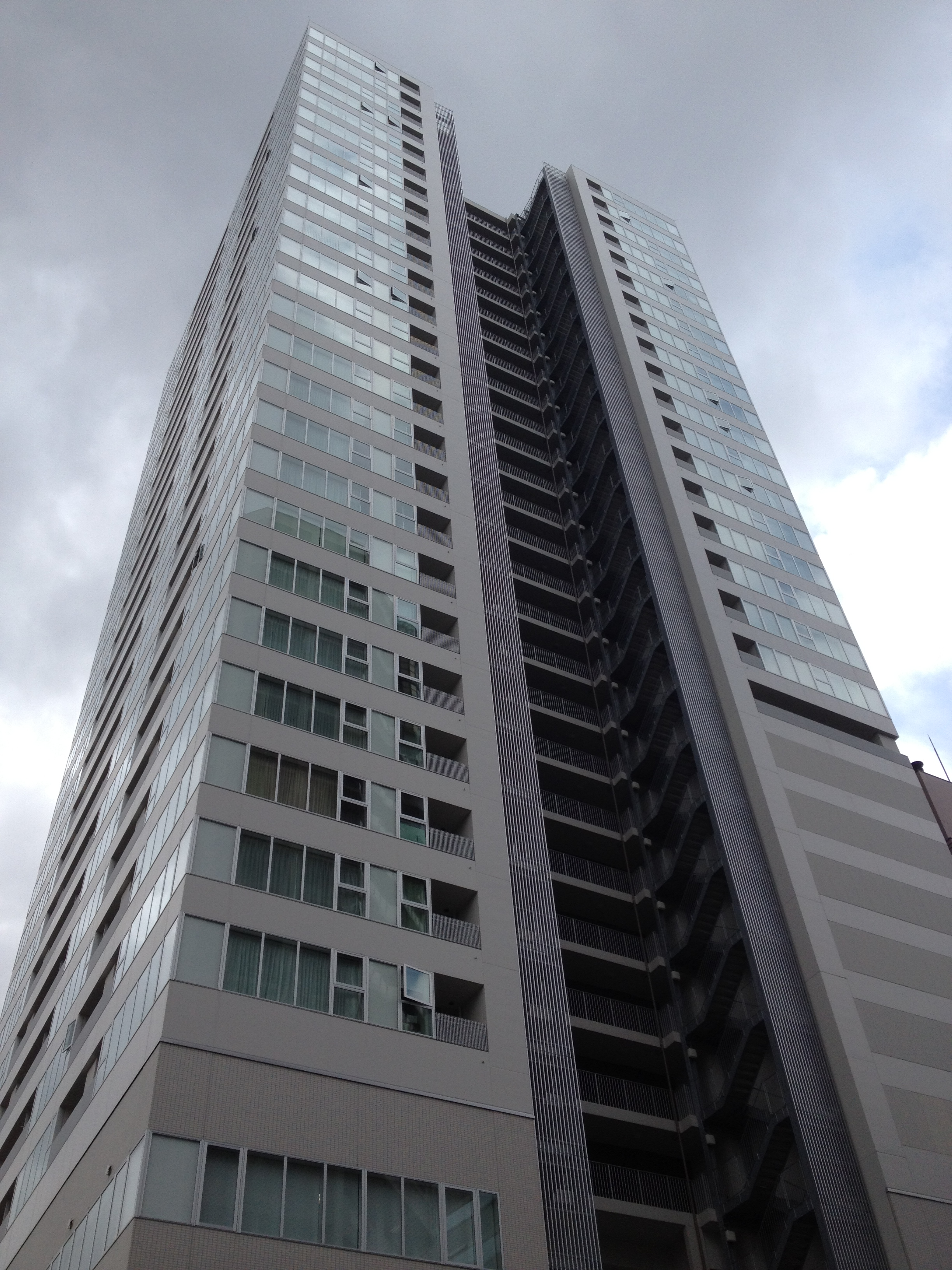 ソララガーデン（シティタワー仙台花京院）